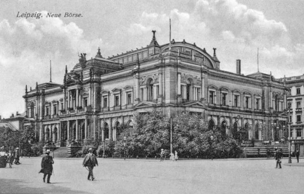 Die Neue Börse am Tröndlinring in Leipzig vor ihrem Umbau 1911